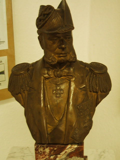 Stralsund, Marinemuseum.